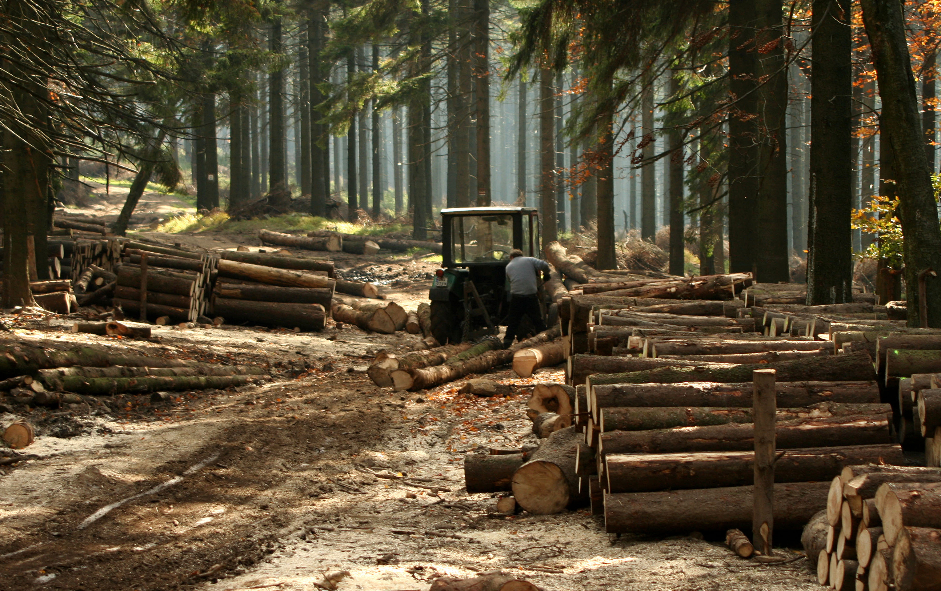 zrywka drewna przy użyciu ciągnika, Góry Sowie